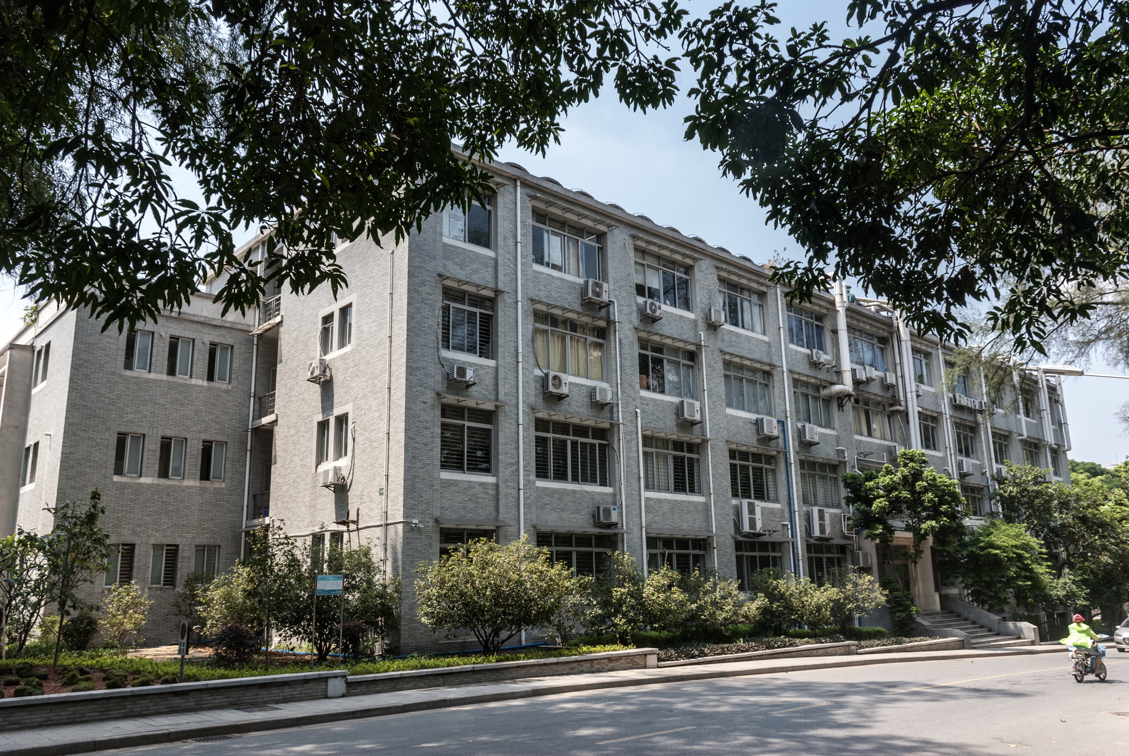 今华南理工大学校13号楼。2014年1月26日公布为广州市第一批历史建筑。